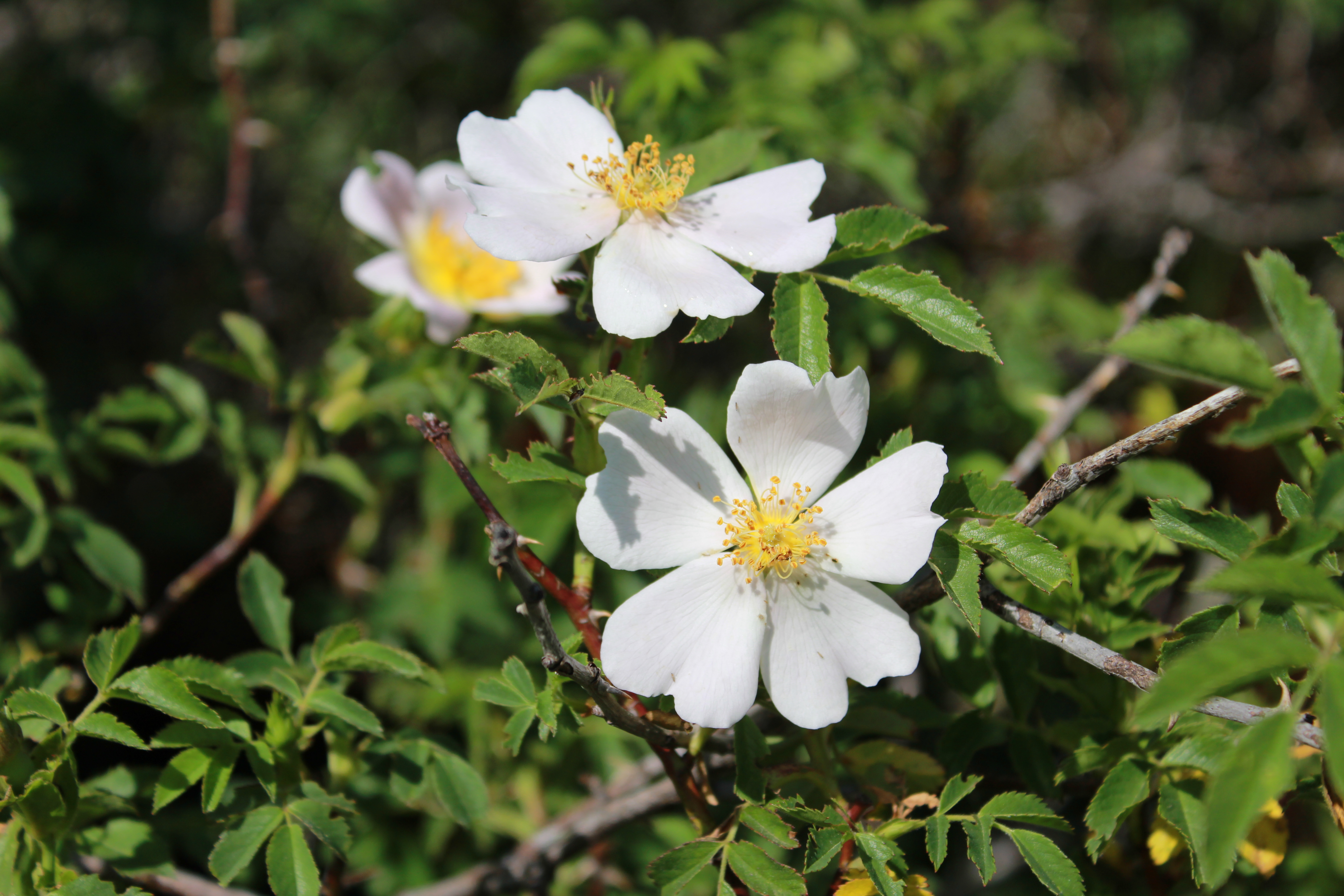 parco nazionale dell'Appennino Tosco-Emiliano (Q1761032)